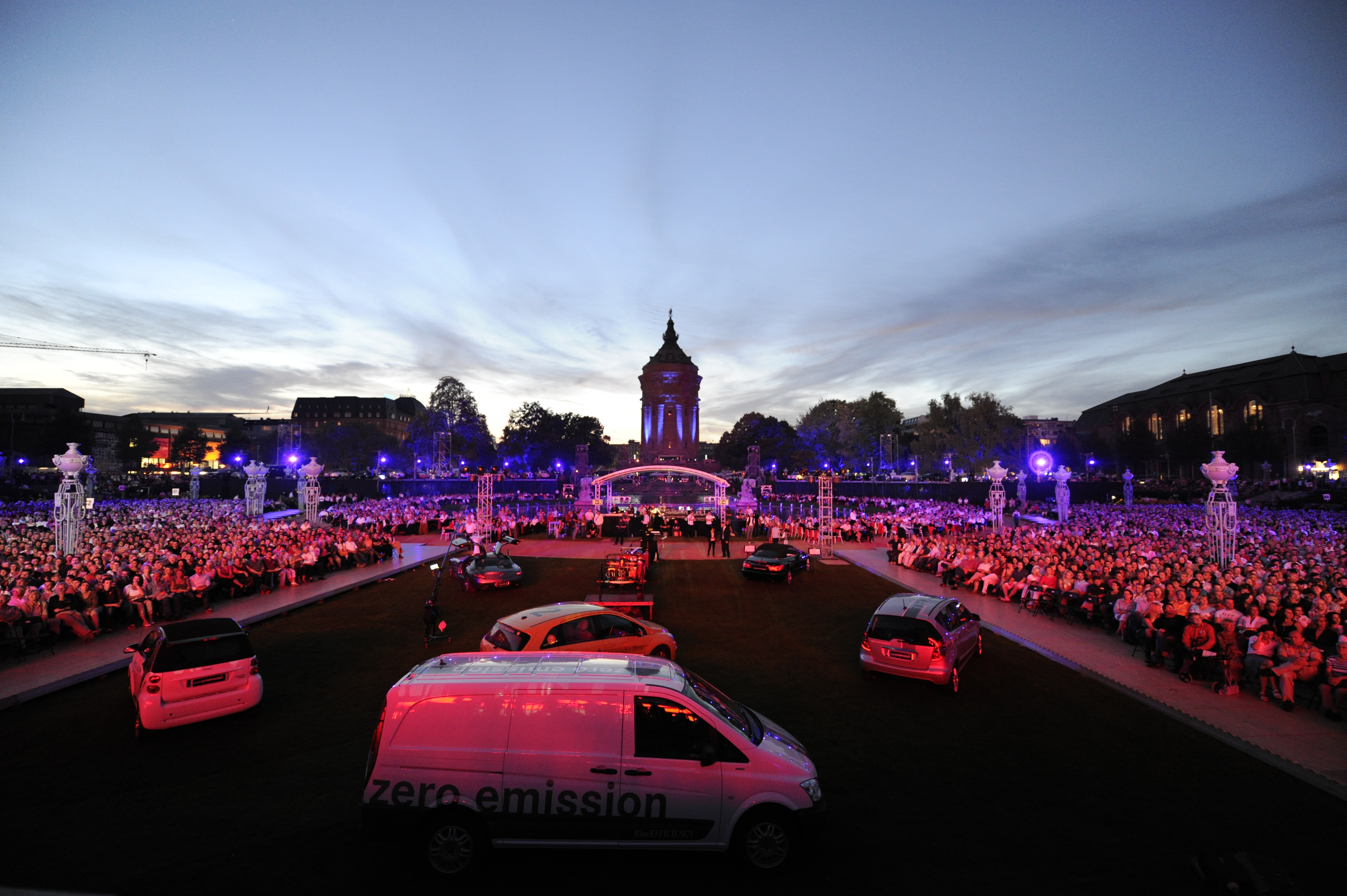 Autosymphonic am Mannheimer Wasserturm